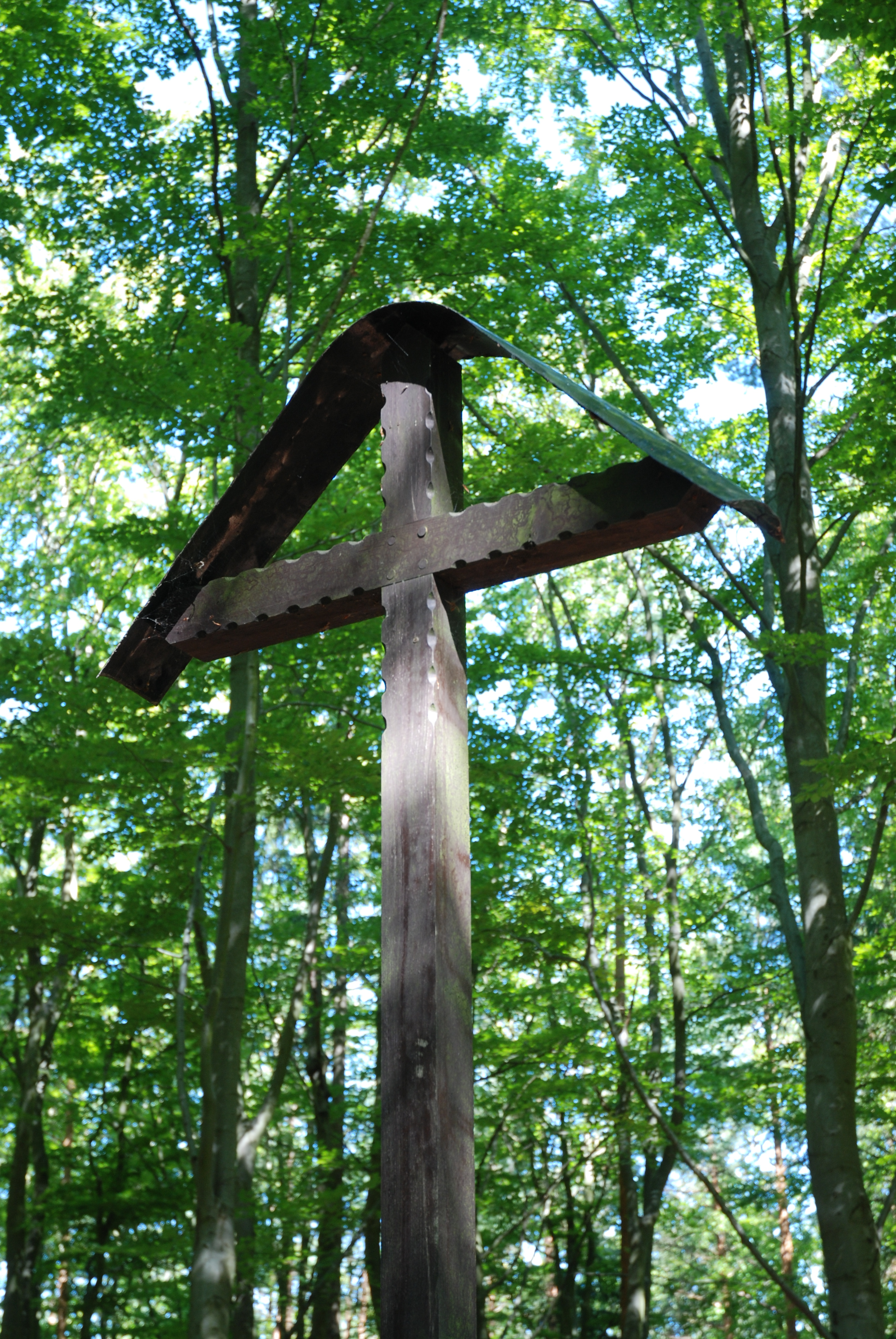 Děkovný kříž v karlovarských lázeňských lesích u rozcestí nad hájovnou v Drahovicích